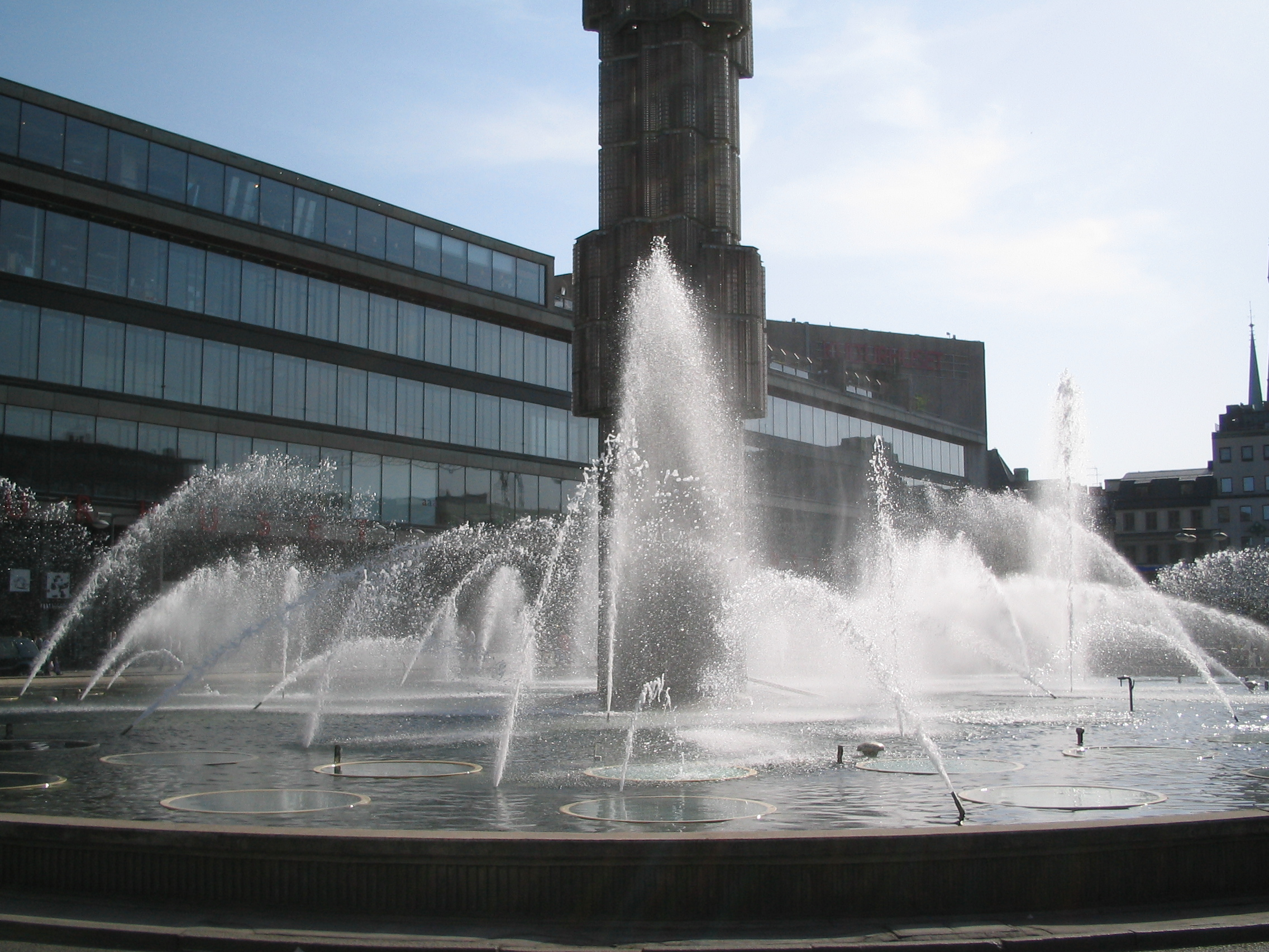 fountain at Sergels torg, Stockholm, Sweden